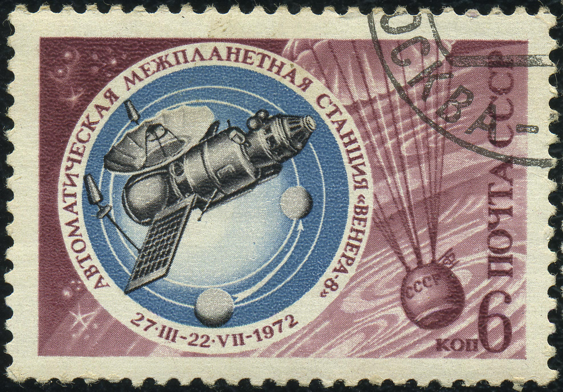 Почтовая марка СССР. 1972. Венера-8